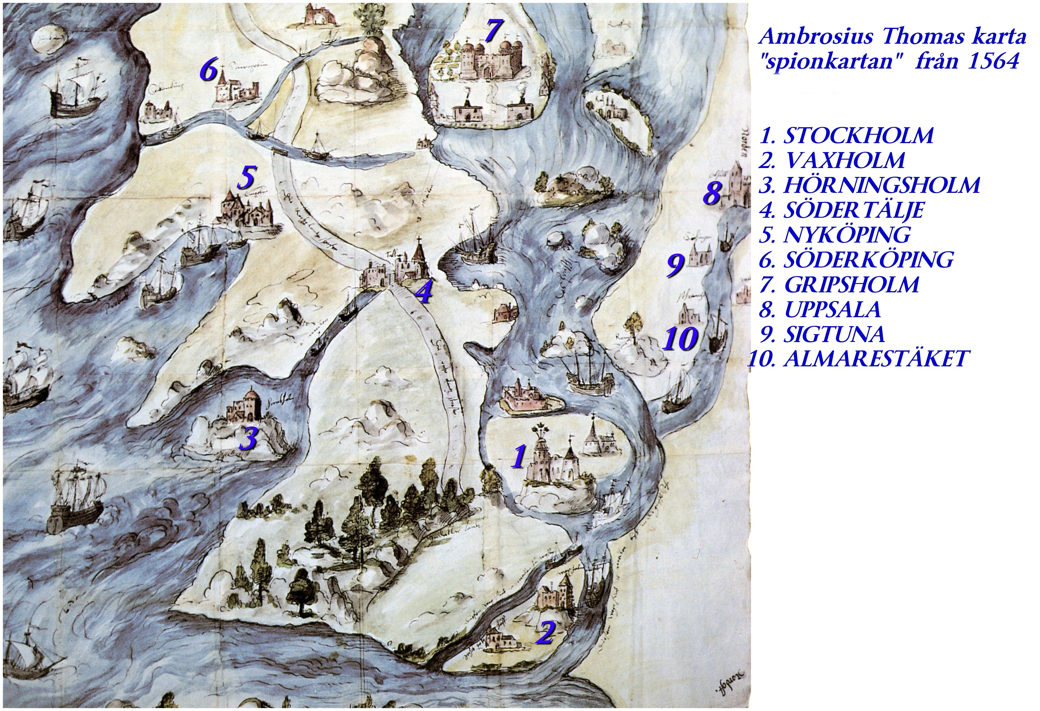 Den så kallade spionkartan som gjordes 1565 för hertig Johans fritagning som satt fången på Gripsholms slott. Östersjön ligger till vänster, Mälaren i mitten av kartan, kartans övre del saknas.